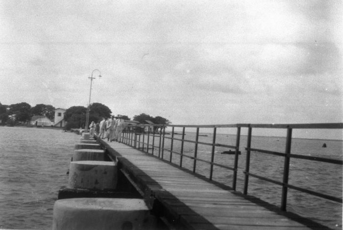 Foto. De pier van het quarantaine eiland Kuiper voor de kust van Batavia